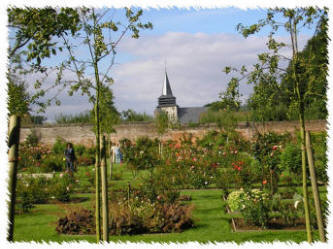 La roseraie du Chateau fort de Rambures